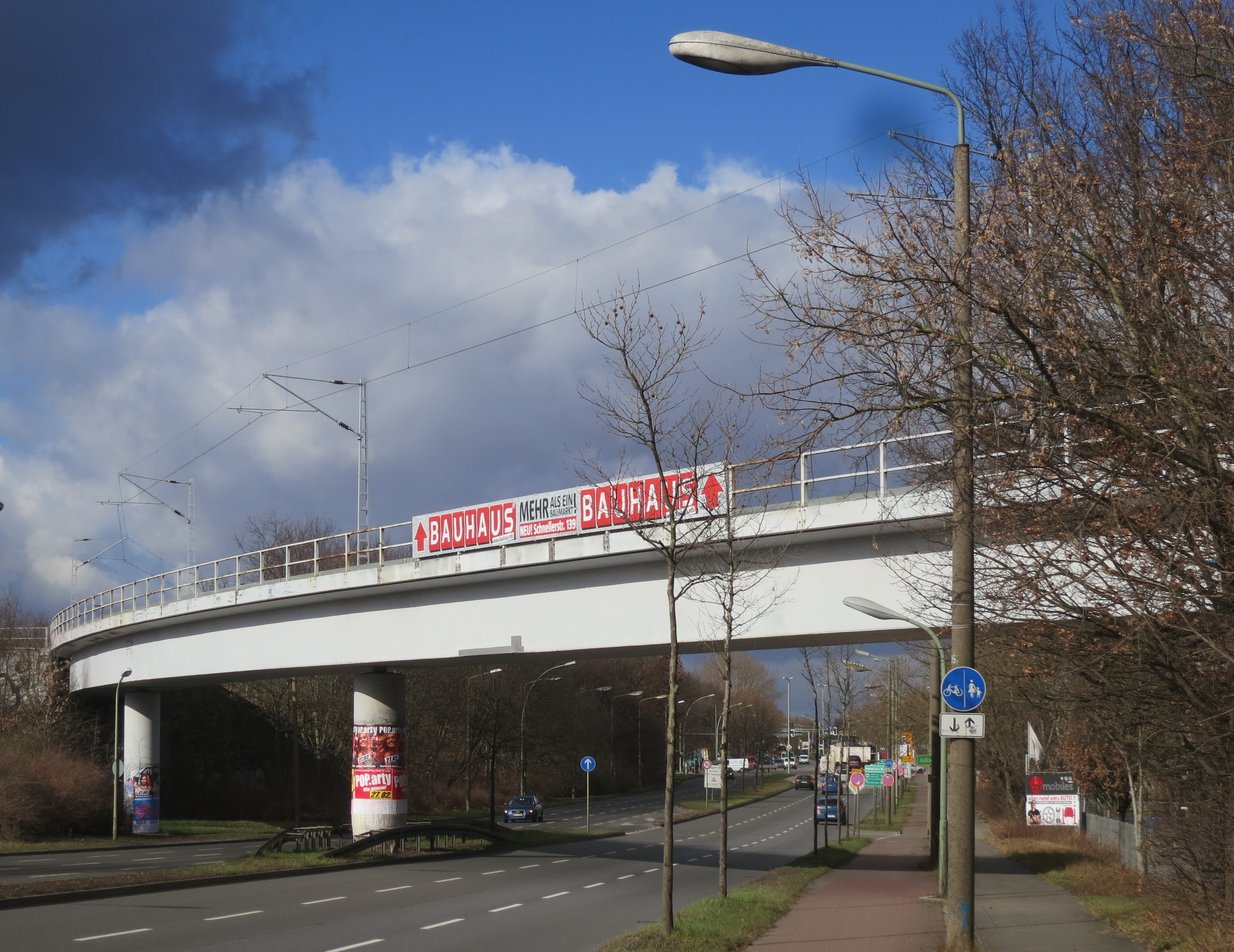 Eisenbahnbrücke nördlich des Grünauer Kreuzes über das Adlergestell